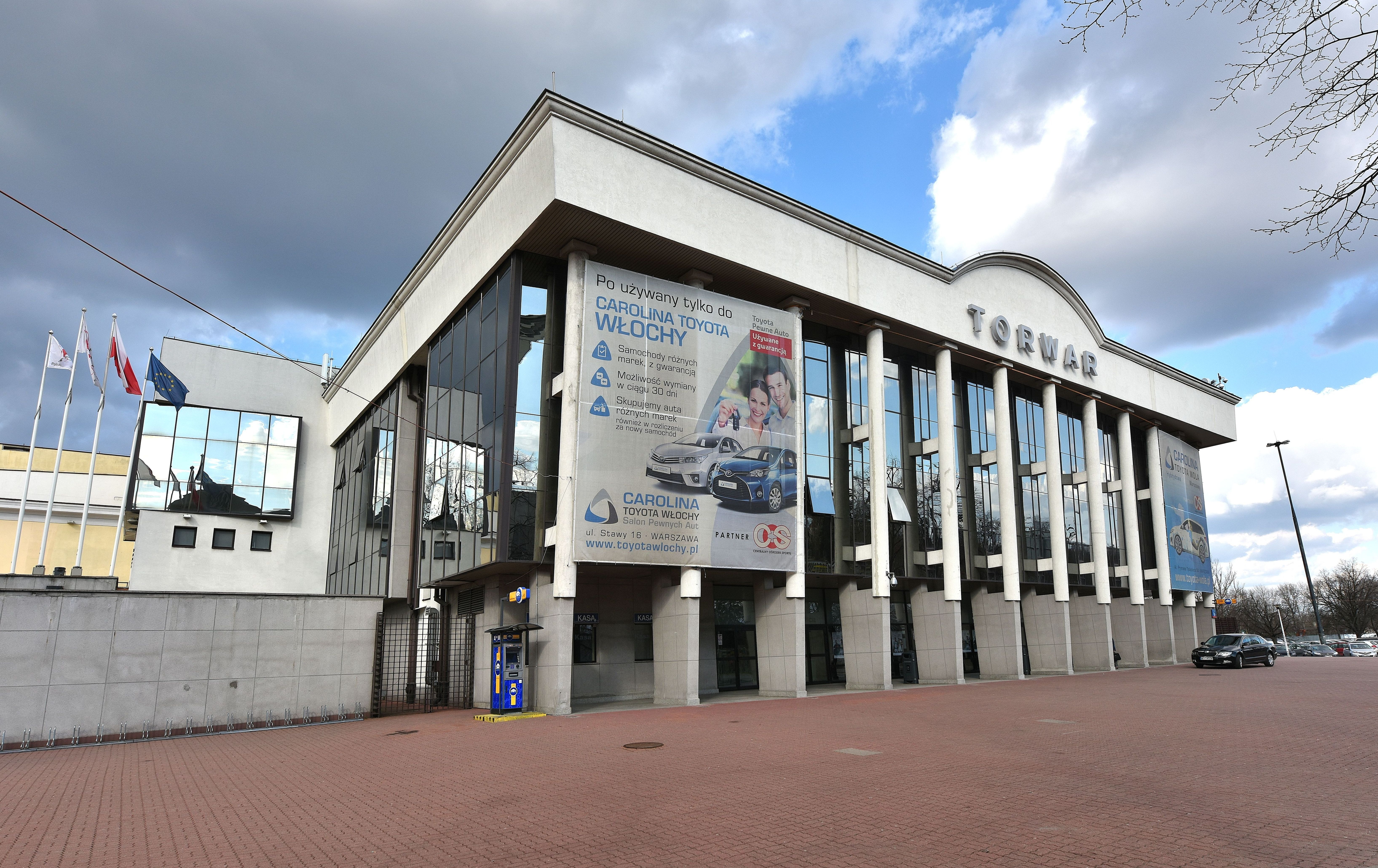 Hala Torwar I w Warszawie